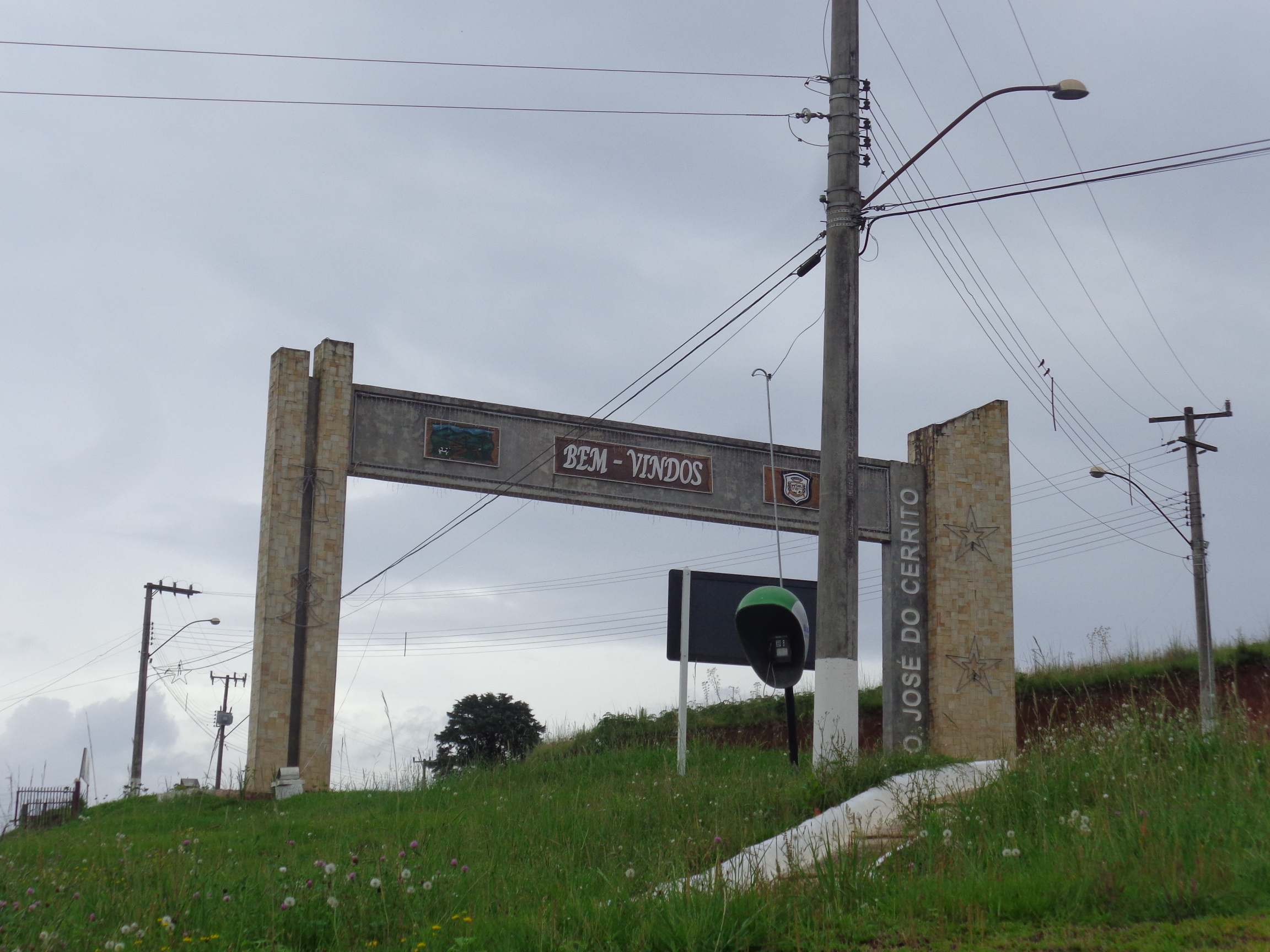 Portal de entrada de São Jose do Cerrito pela BR-282